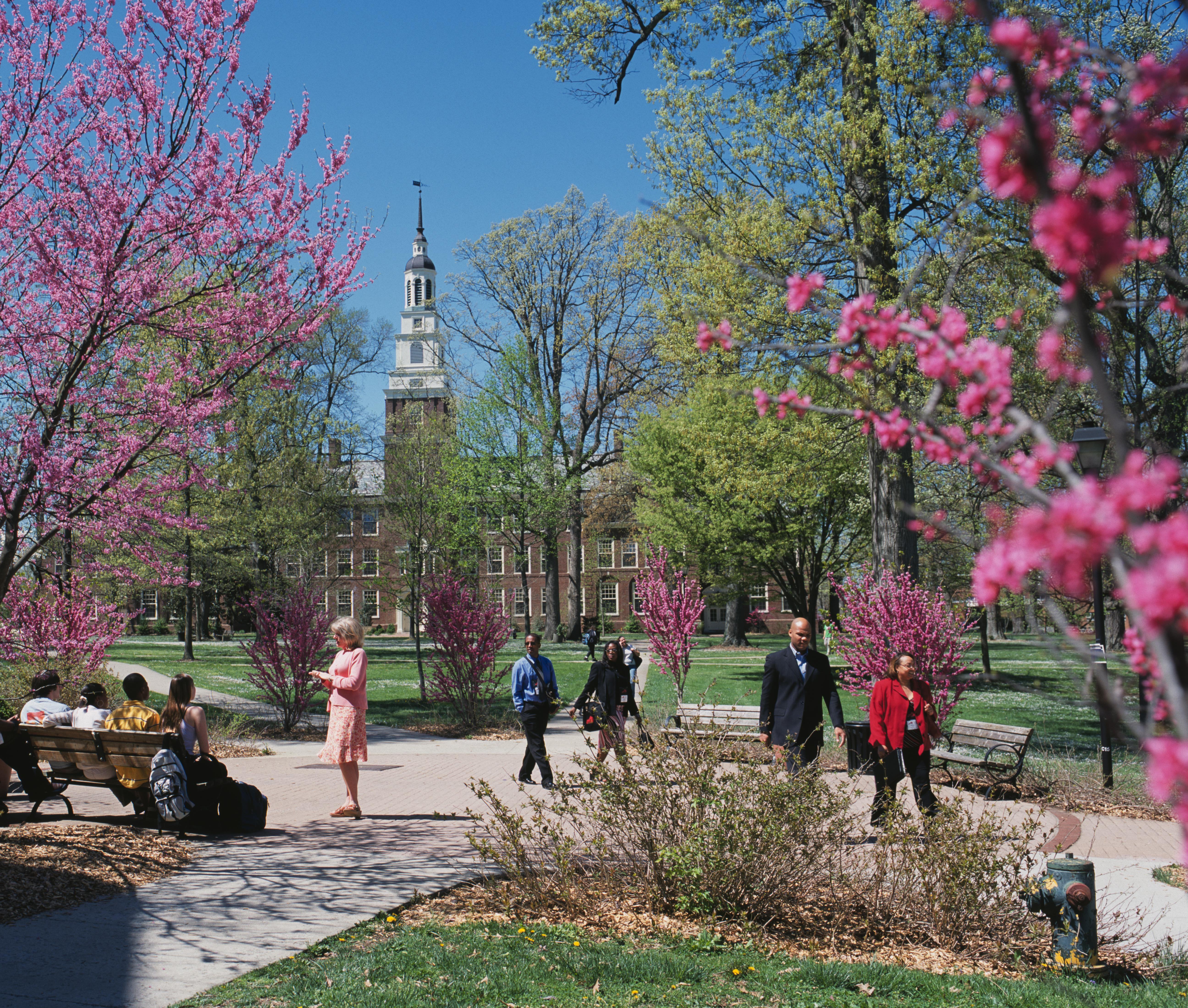 06Quad-3